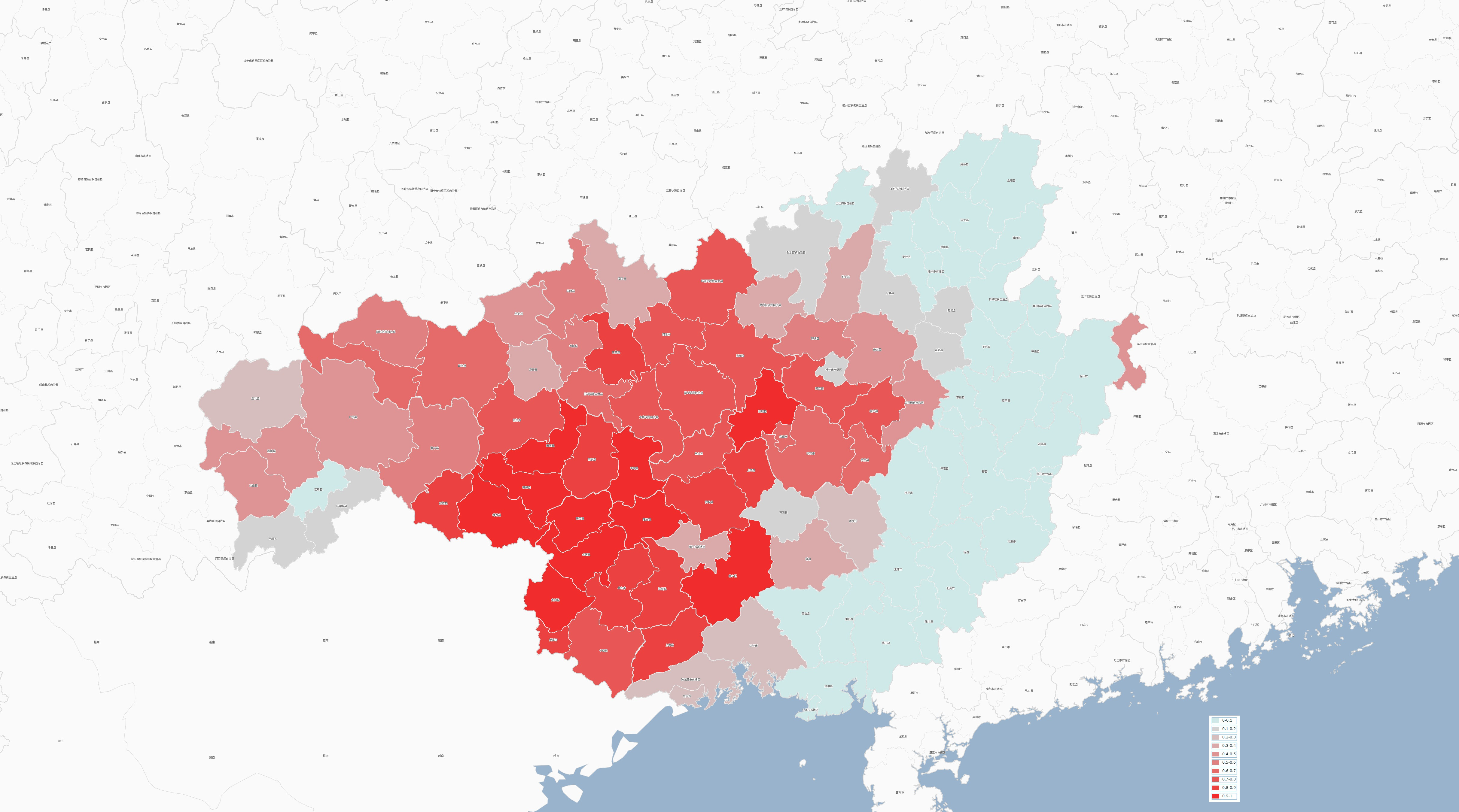 数据来源:沙南曼森整理的《广西各县市壮族人口排序》，云南及广东部分为作者查找。(注意:由于原数据文件未添加具体数据来源,真实性有待读者进一步考证)